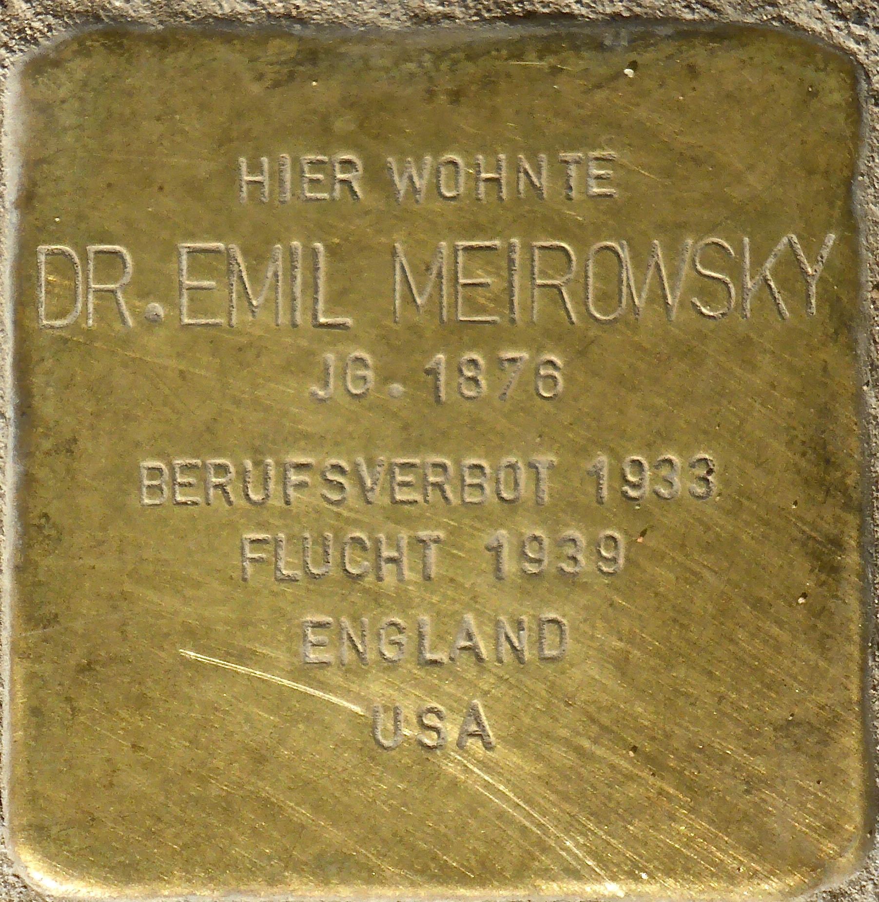 Stolperstein für Dr. Emil Meirowsky, Köln-Lindenthal, Fürst-Pückler-Str. 42 (Zustand Ende März 2015)